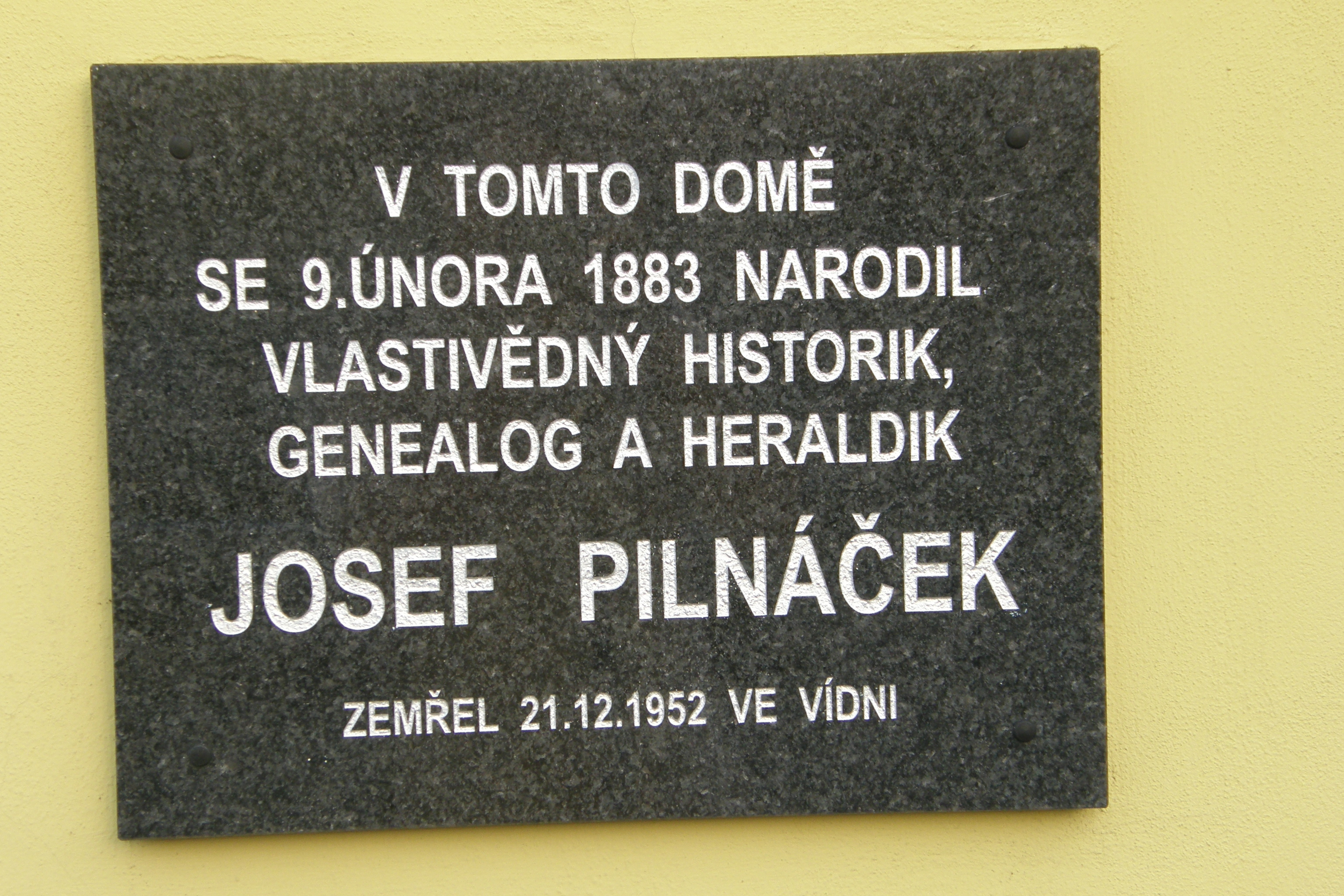 Pamětní deska v Černé Hoře, okres Blansko, připomínající narození Josefa Pilnáčka